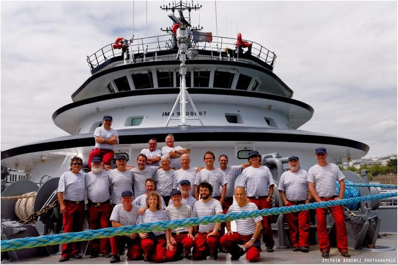 Les marins d'Iroise, sur l'Abeille Bourbon